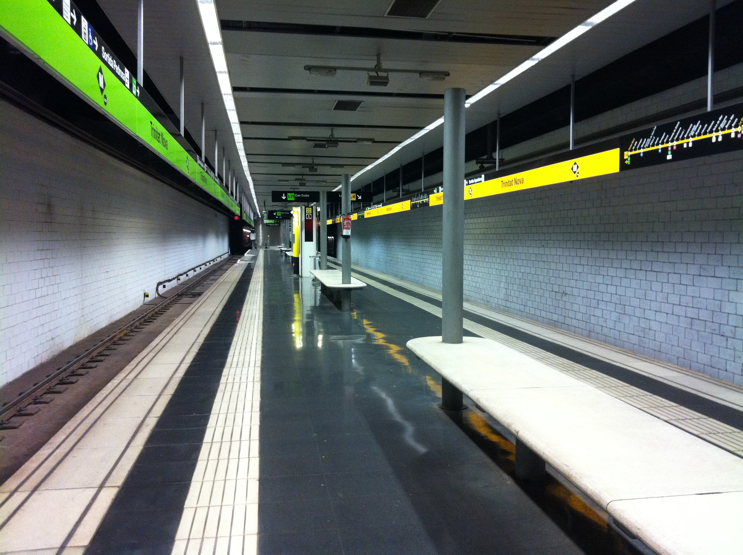 Estació de Trinitat Nova